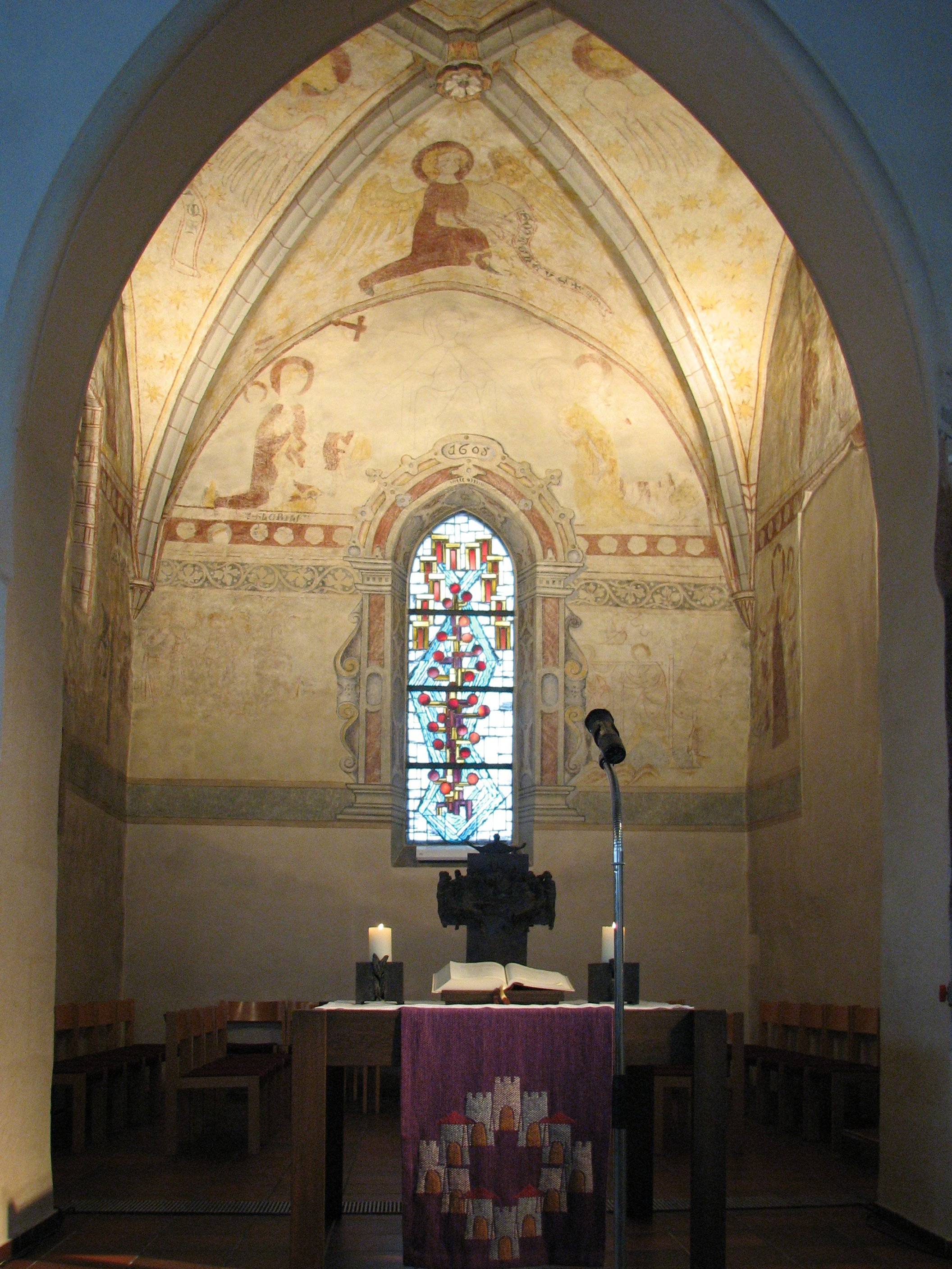 Der Altarraum der evangelischen Kirche von Esslingen-Zell ist der älteste erhaltene Teil der Kirche